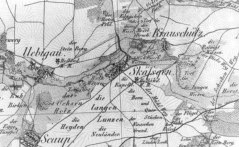 Original image description from the Deutsche Fotothek Zabeltitz-Skäßchen. Oberreit, Sect. Großenhain, 1841/43